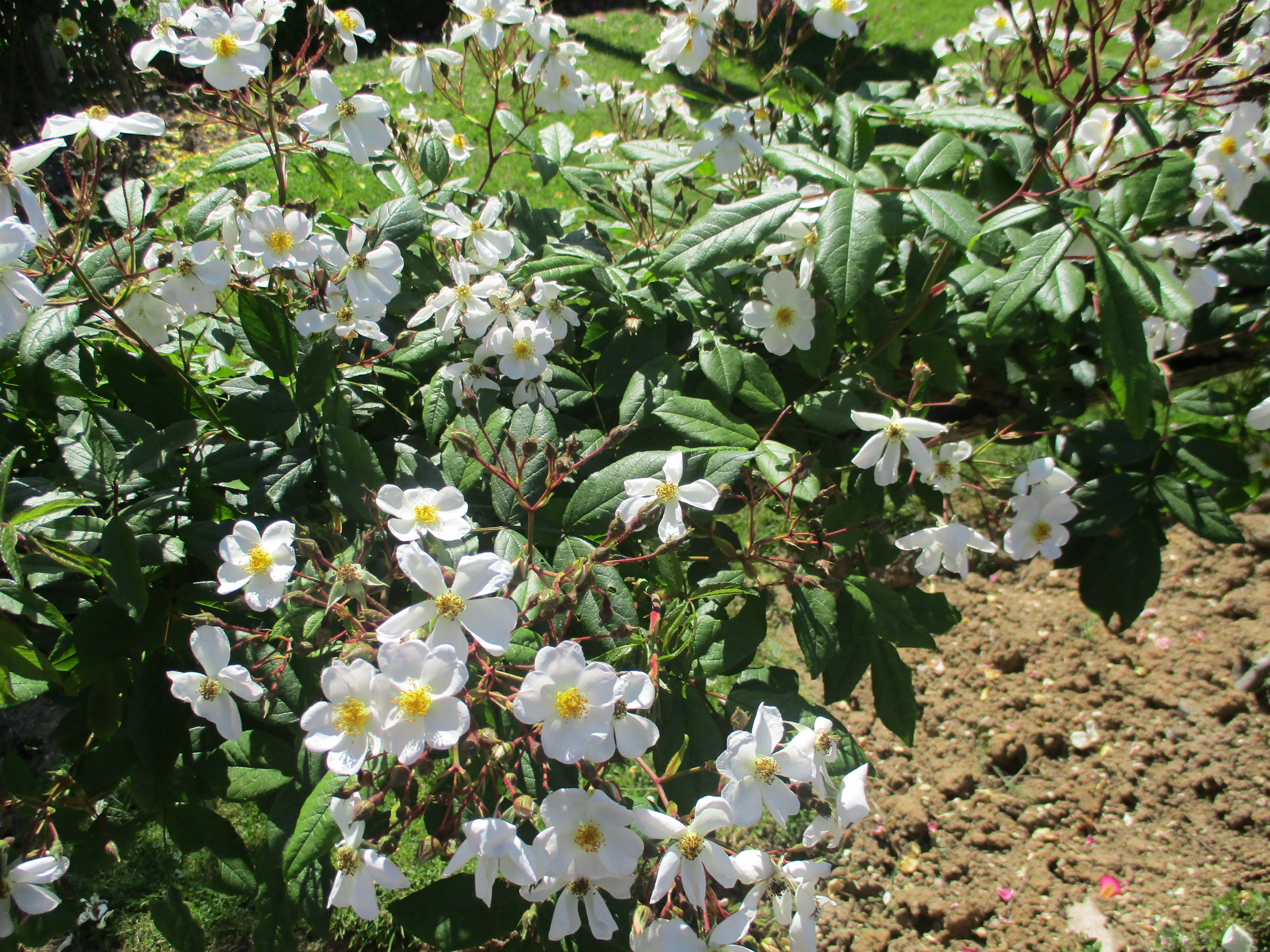 Rose 'Pleine de Grâce' (Lens). Roseraie de Bagatelle